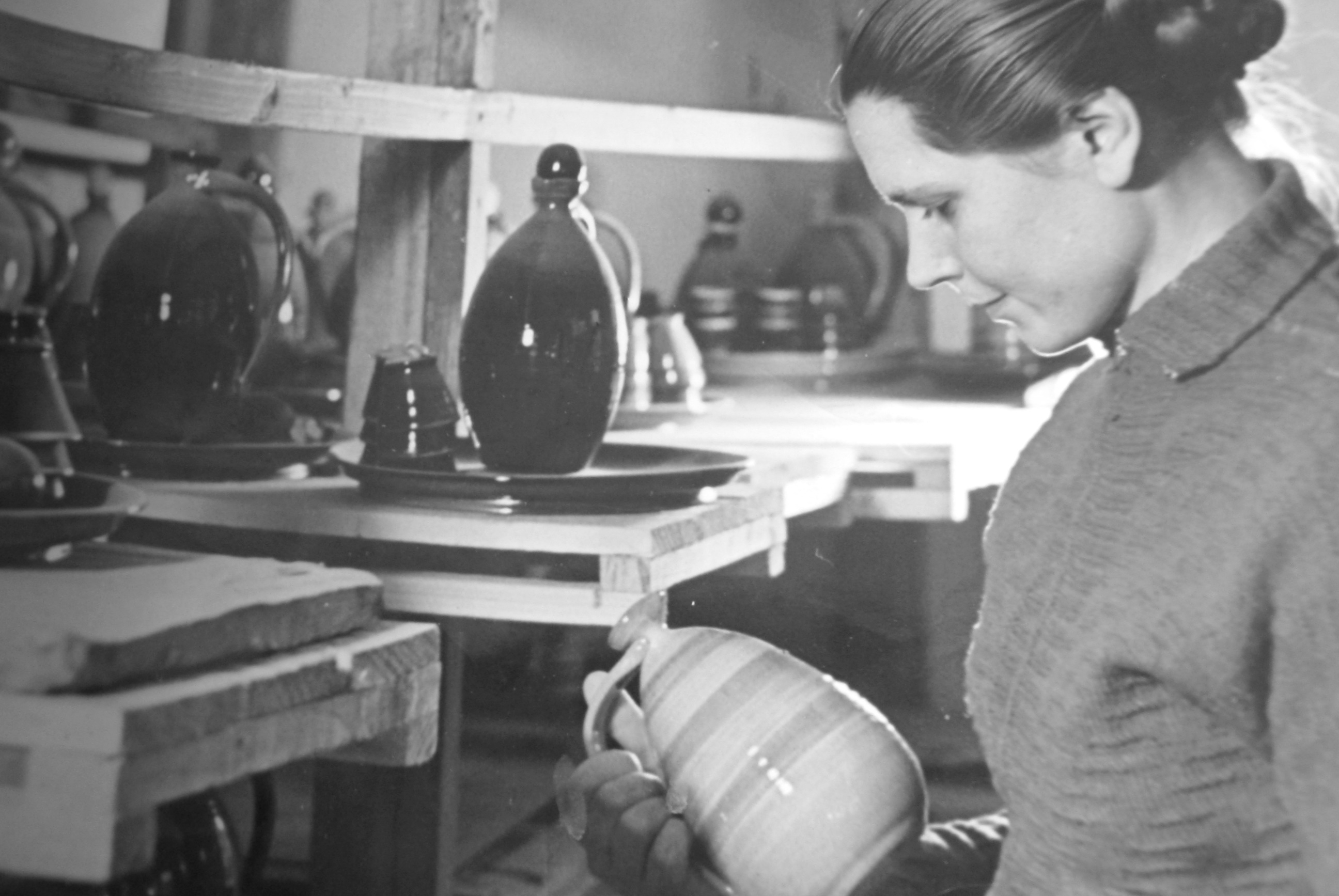 Keramiķe Marija Ozoliņa